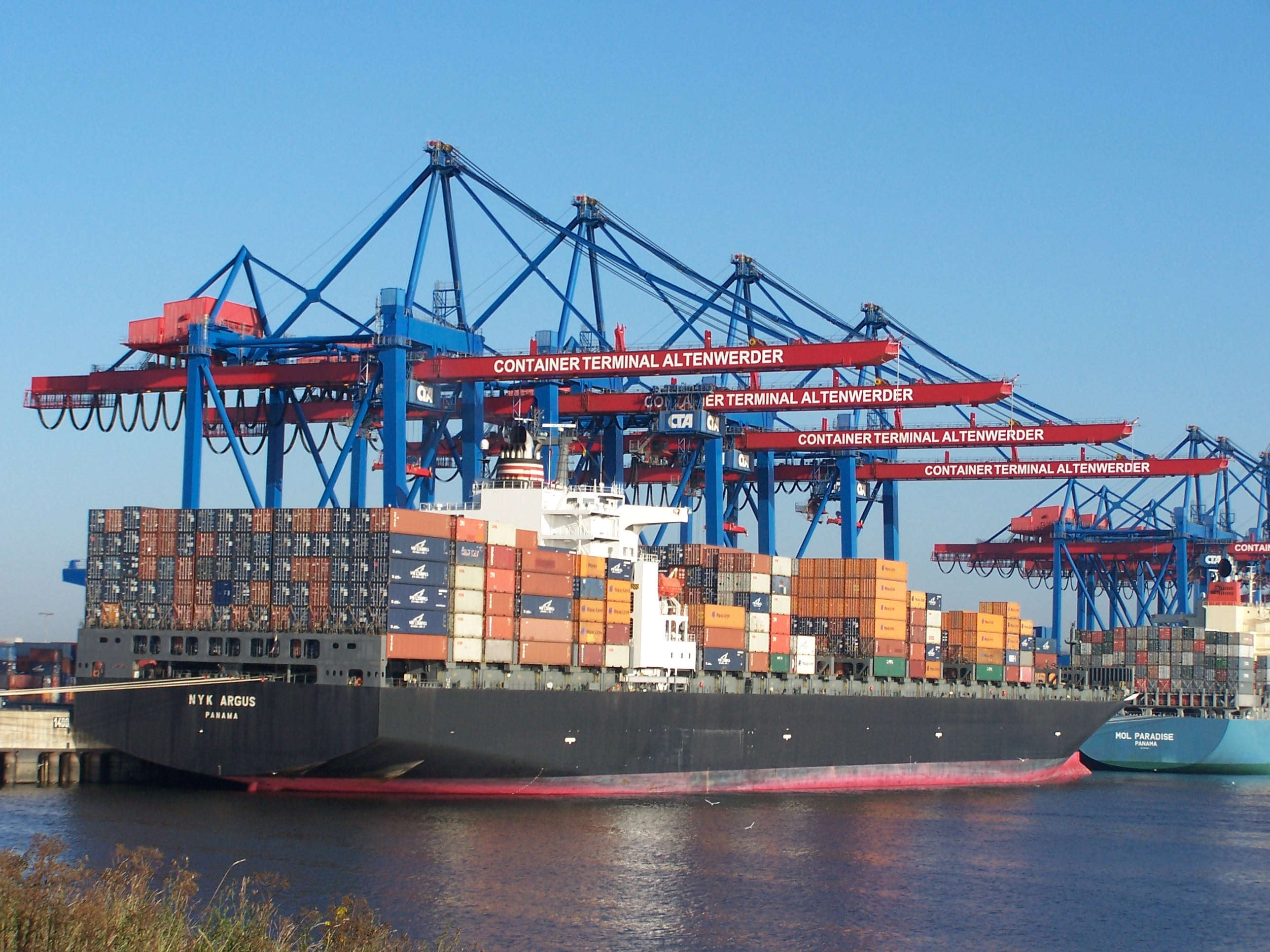 Die NYK Argus und MOL Paradise am Containerterminal Altenwerder NYK Argus IMO Number: 9262716 MMSI Number: 356872000 Callsign: HPZA Length: 299 m Beam: 40 m MOL Paradise IMO Number: 9307047 MMSI Number: 371380000 Callsign: 3ECJ7 Length: 293 m Beam: 40 m